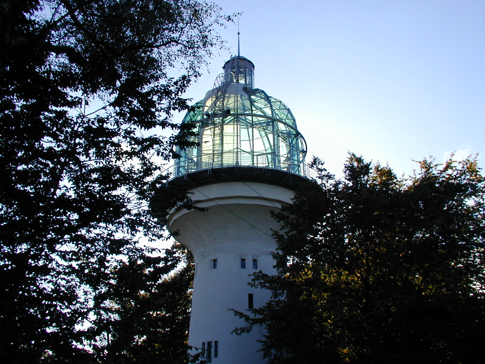 Der Gräfrather Lichtturm in Solingen 2001 selbst fotografiert